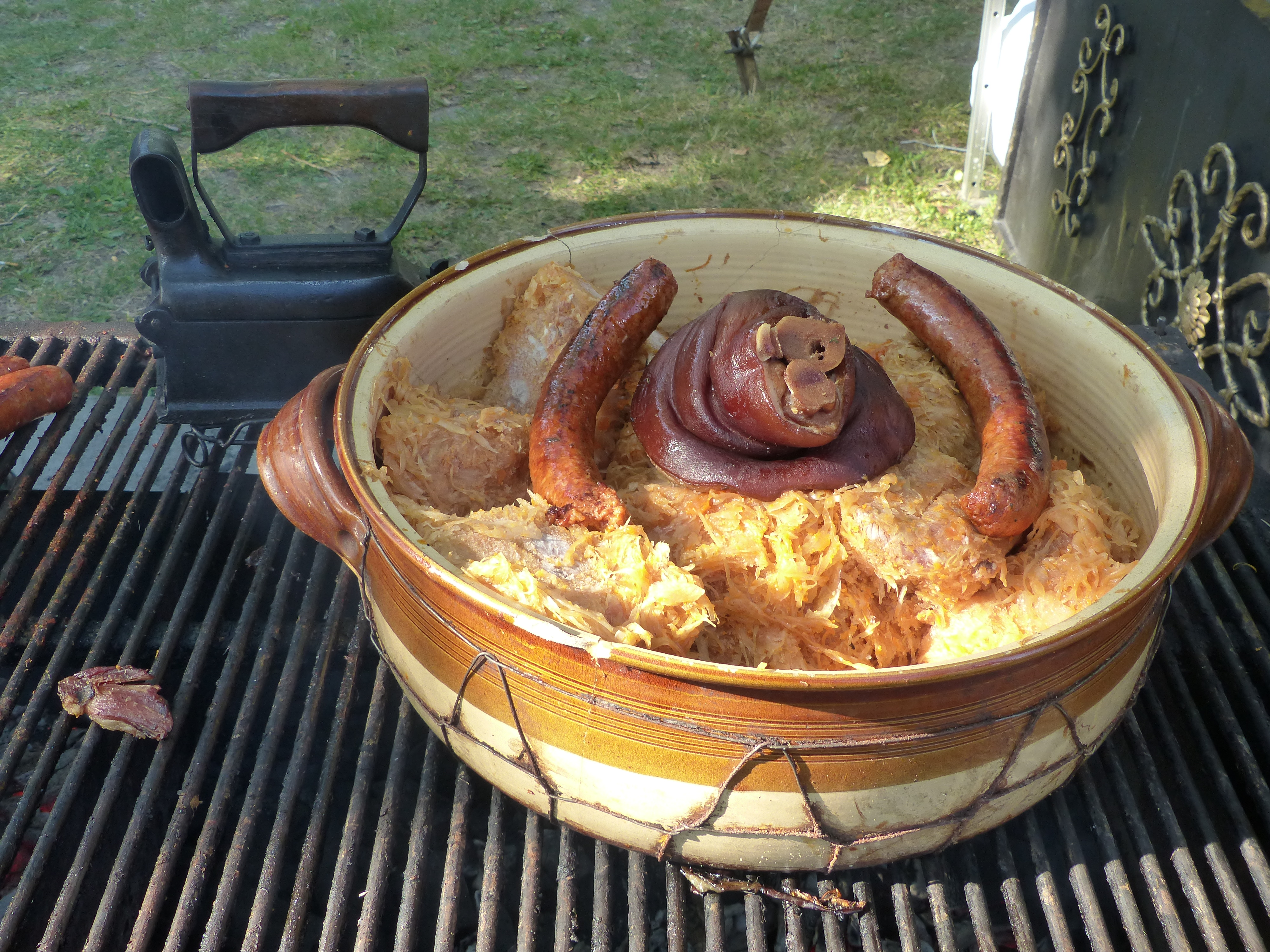 A felvétel 2016. augusztus 27-én szombaton készült Balatonkenesén. Lecsófestivál. Székelykáposzta csülökkel.